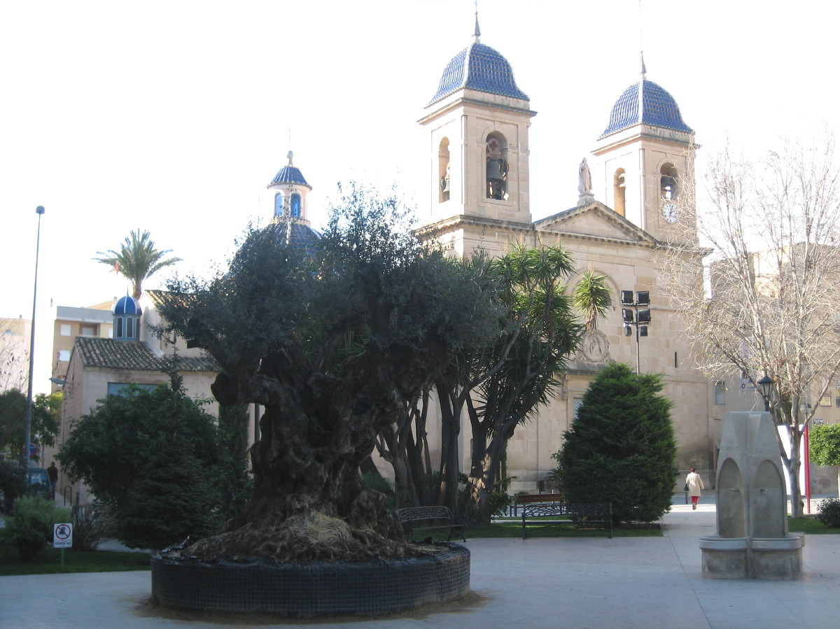 San Juan de Alicante: foto de la plaza del Ayuntamiento, con la iglesia al fondo (tomada a enero del 2006)